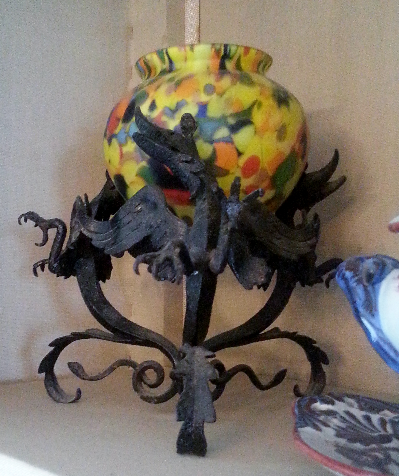 Opera di Umberto Bellotto ferro battuto e vetro di Murano